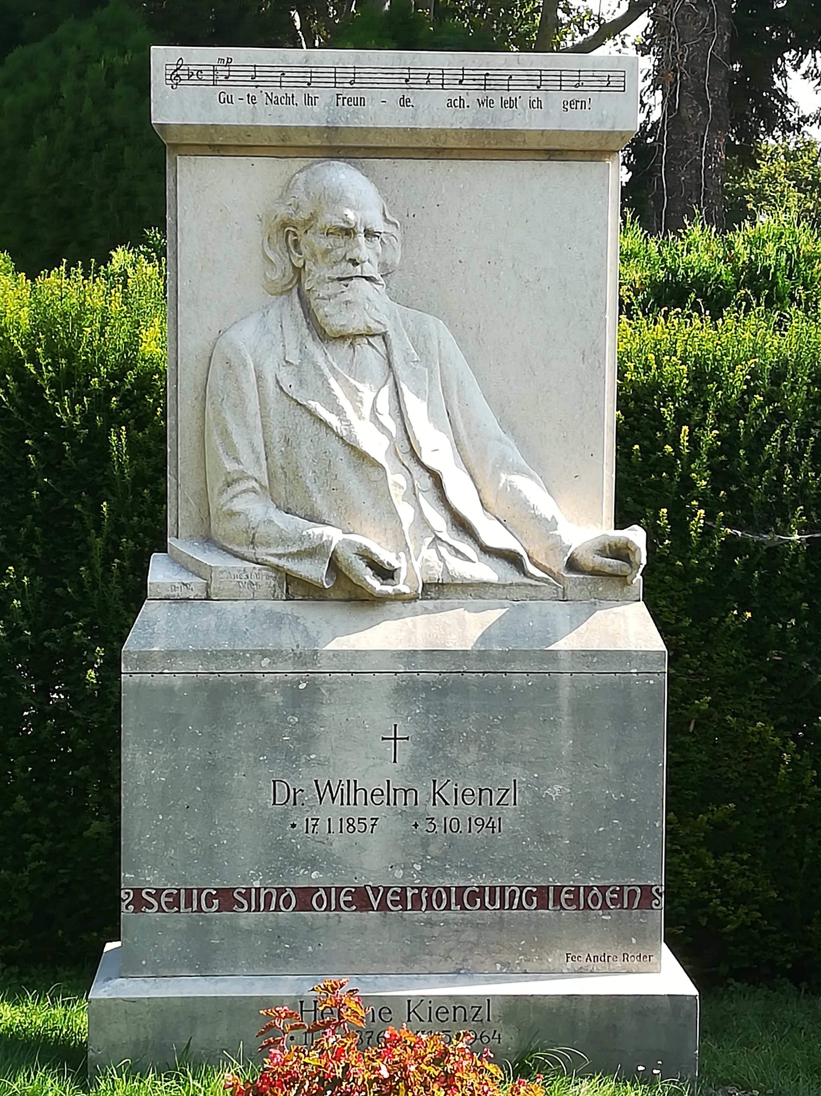 la tomba di Wilhelm Kienzl